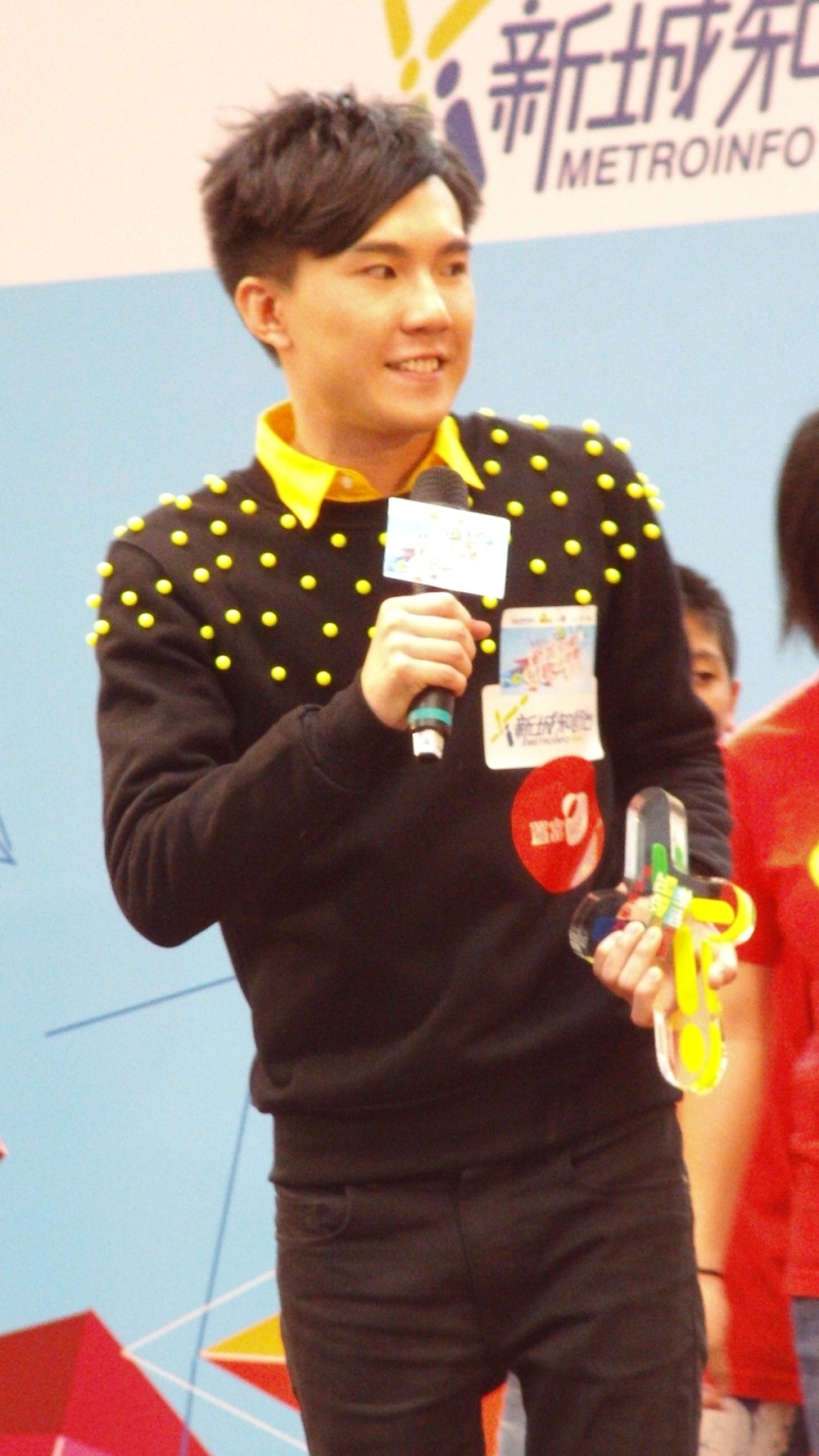 中文（香港）: 何偉圖的樣子